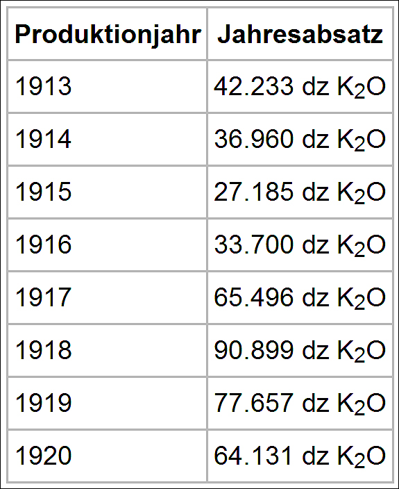 Produkt-Absatz der Kaliwerke der Gewerkschaften Walter und Irmgard